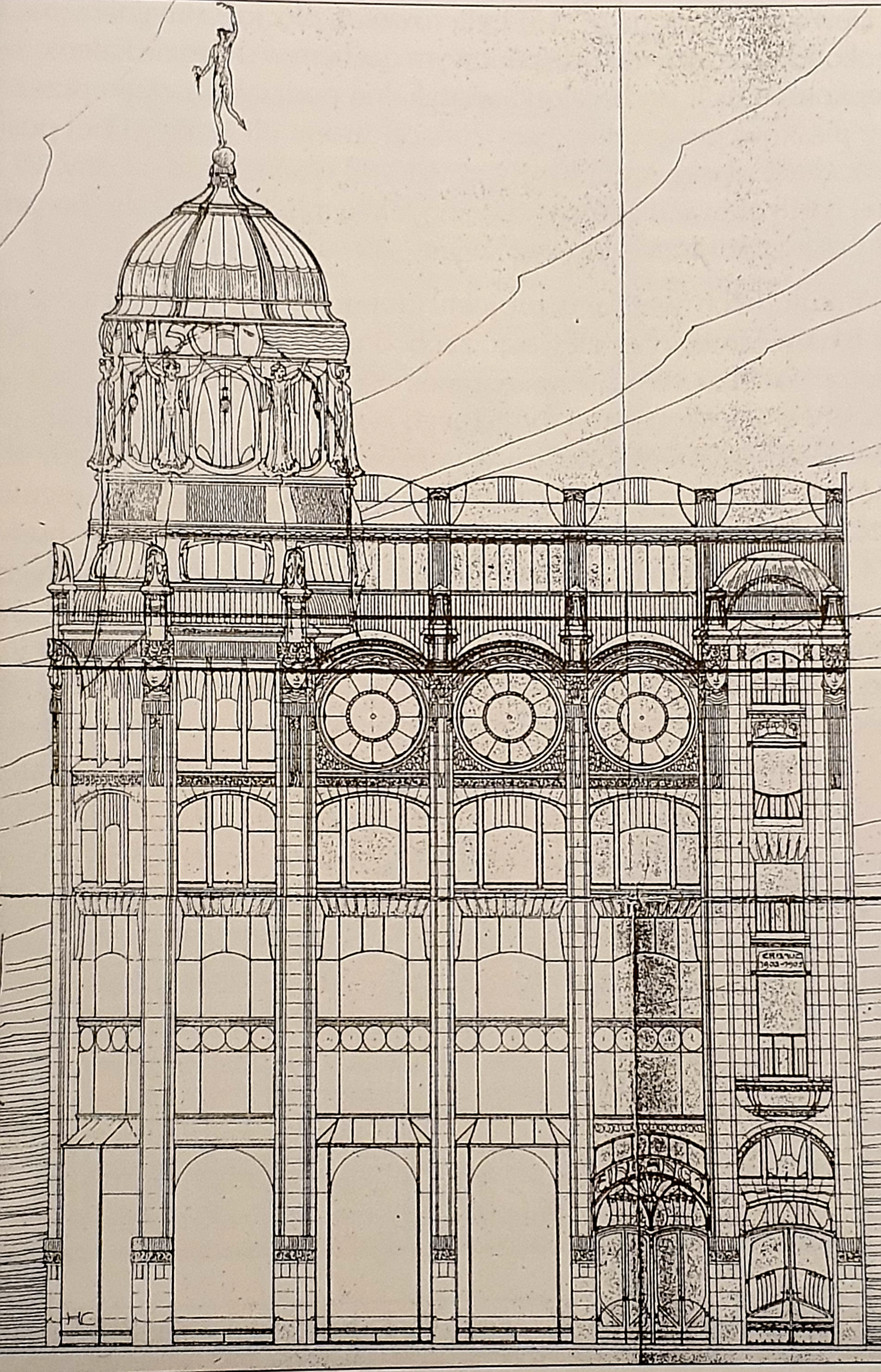 Dom Handlowy Braci Barsch - pierwsza wersja projektu z 1902 roku autorstwa Georga Schneidera.